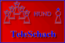 Logo der Webseite TeleSchach. Geschütztes Bildzeichen: links die Mutter Juliane mit den vier Töchtern und rechts der Vater.